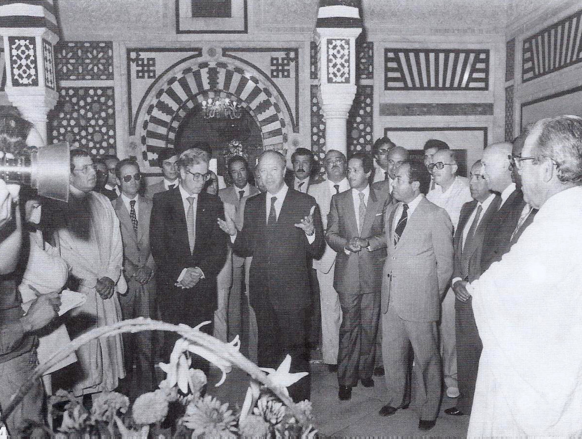 Juin 1981, cérémonie d'installation de Mahmoud Masmoudi en tant que secrétaire d'état aux affaires étrangères avec Béji Caïd Essebsi.